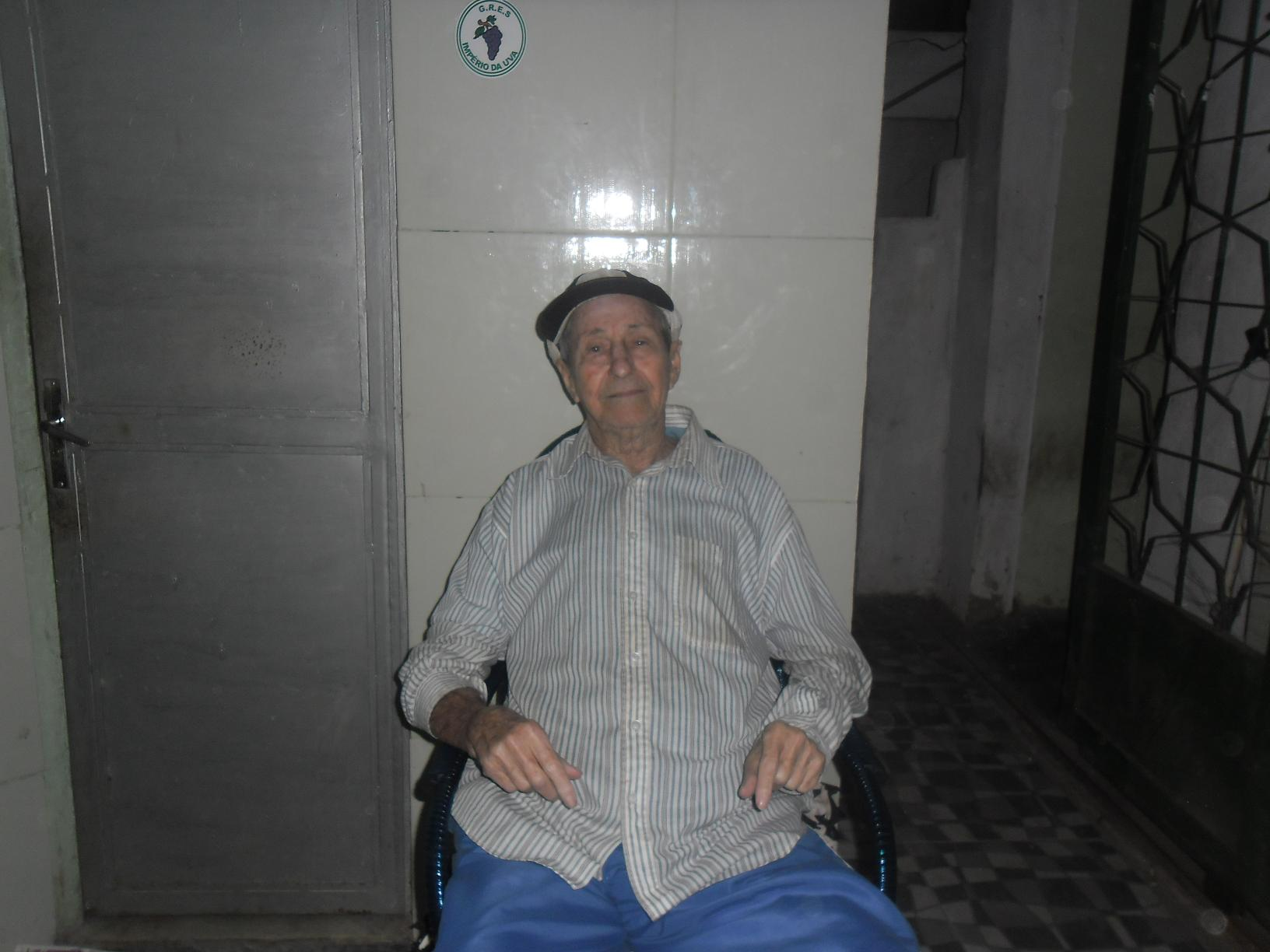 Sr. Vicente de Paula, conhecido como Natinho, presidente de honra do GRES Império da Uva.